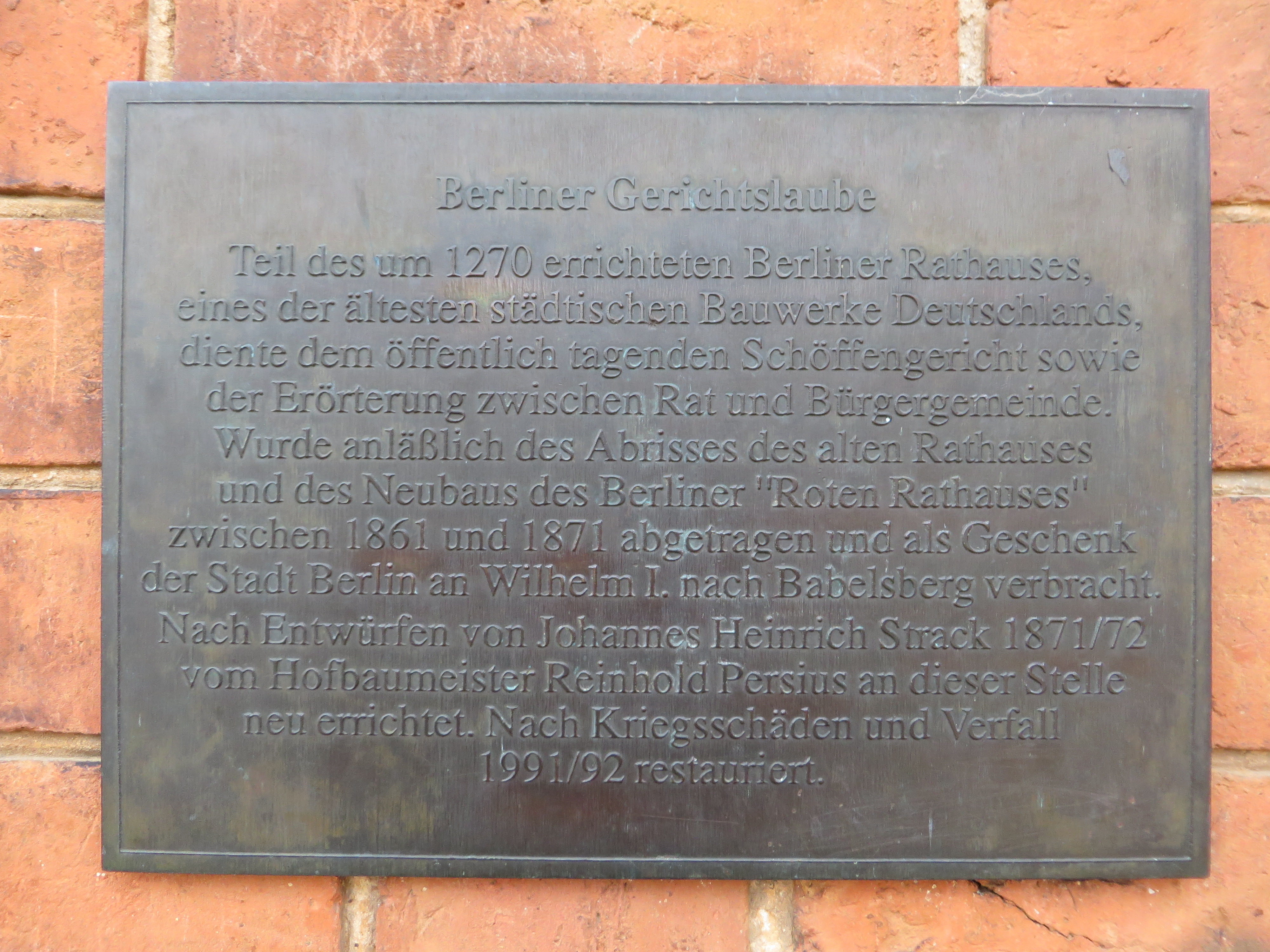 Gedenktafel an der Berliner Gerichtslaube in Potsdam 03/2017